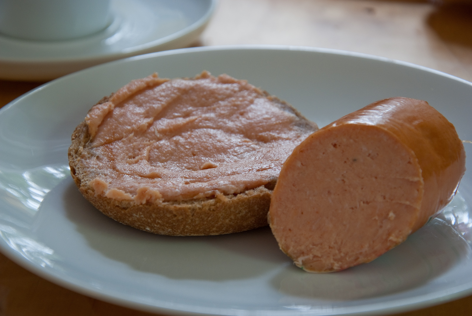 Teewurst, eine geräucherte Streichwurst